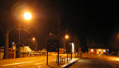 foto: johhja